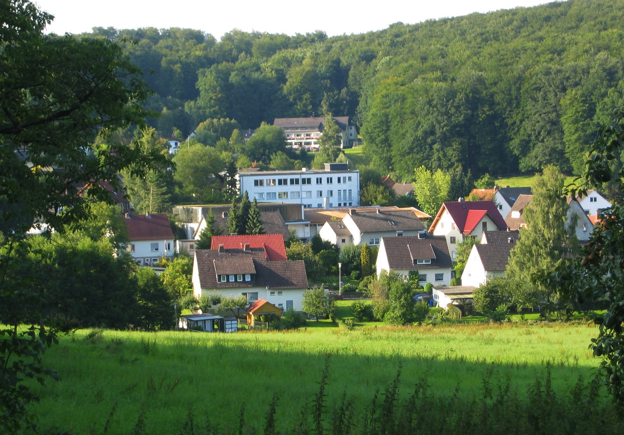 Blick von Süden auf Siebenstern, Bad Driburg, Deutschland.